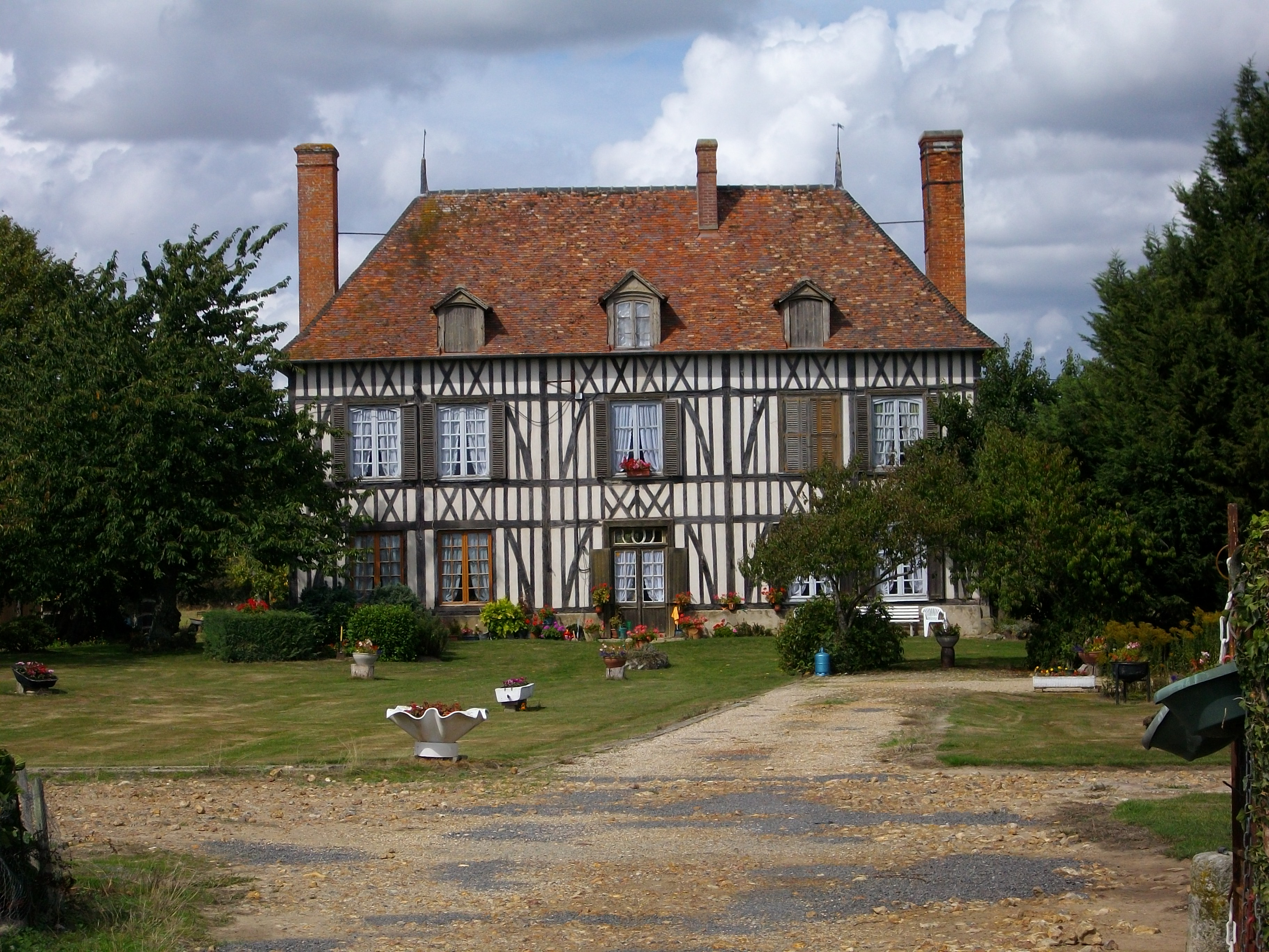 La Rufaudière à Granchain : Fief mentionné depuis 1562 dont le logis a été reconstruit en 1774